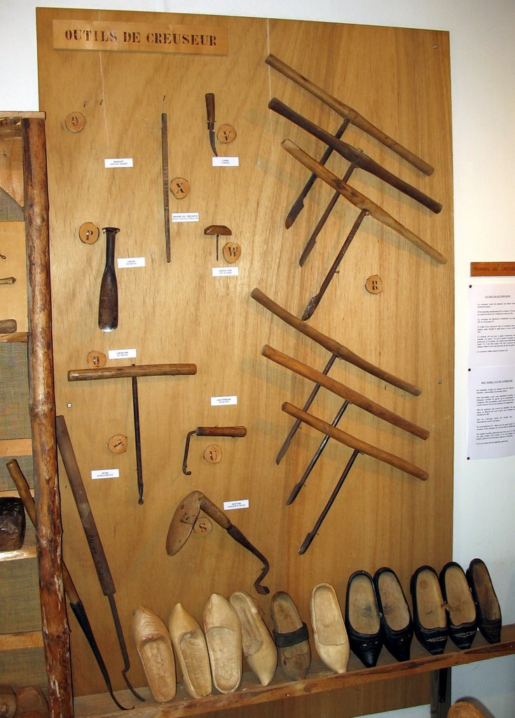 Outils du creuseur. P : gouge / Q : tarrière / T : ruines / S : boutoir / R : cuillers / U : grateresse. (Musée du sabot, Porcheresse) - ]